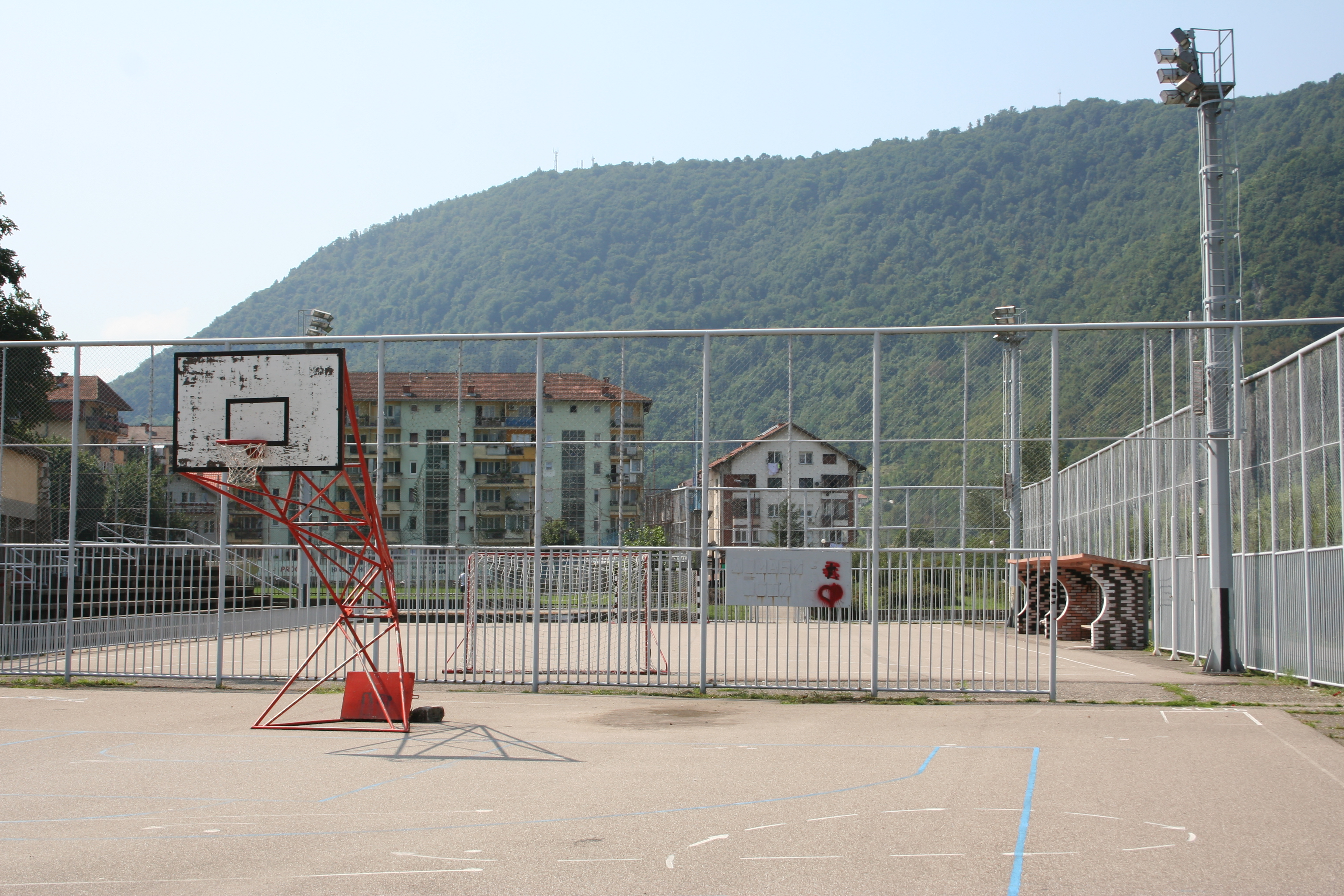 Sportski tereni na šetalištu, Mali Zvornik